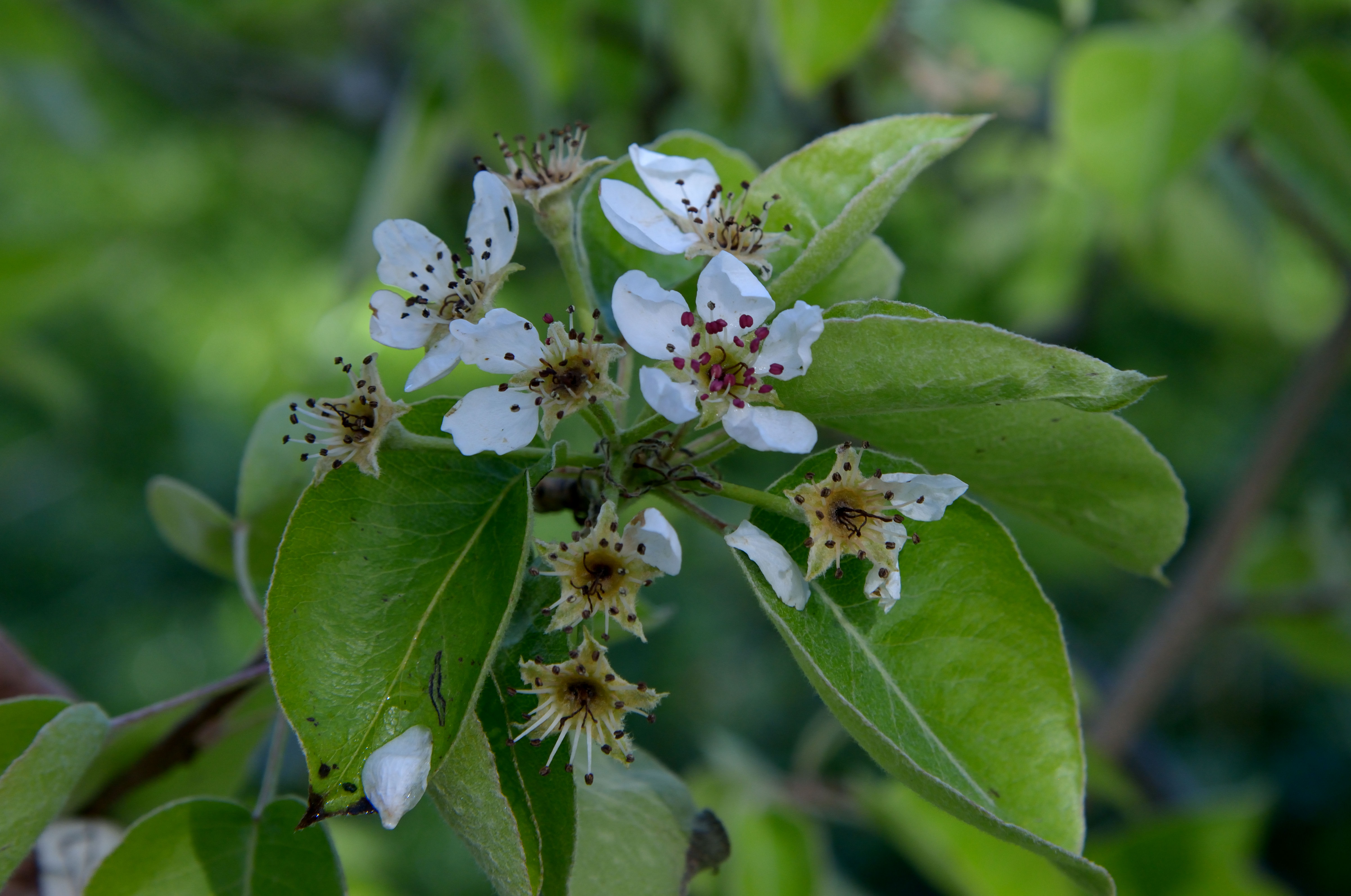 Pyrus communis flowers frost damage, brown pistils